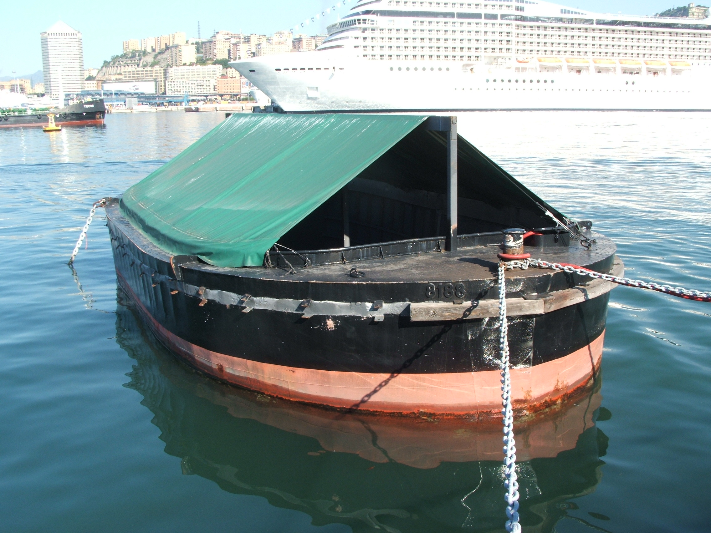 Immagine dal porto antico di Genova, Italia.